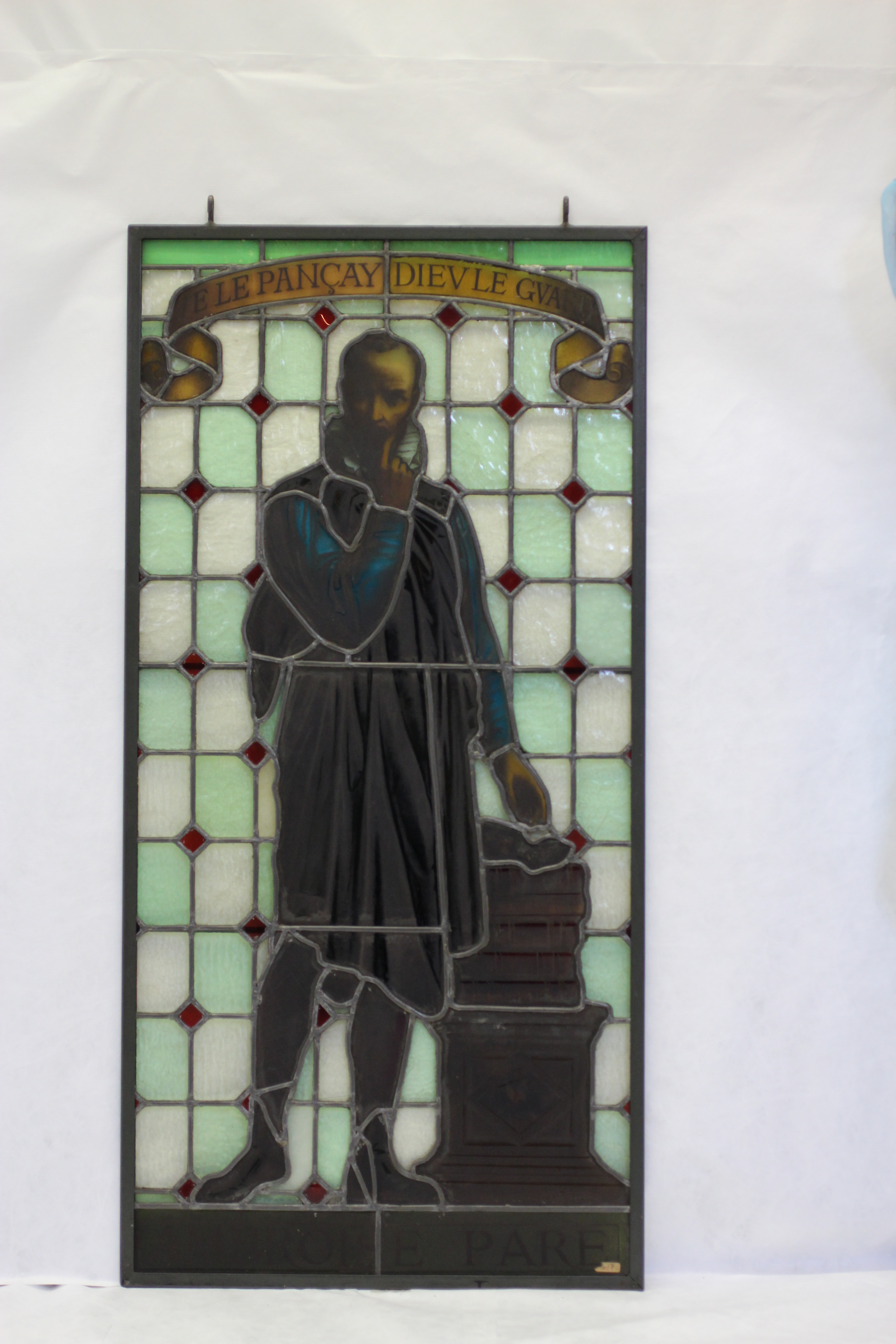 Vitrail représentant Ambroise Paré , Propriété du Musée des Hospices civils de Lyon - Collections Musée de France INV : 2007.0.1973.M 04